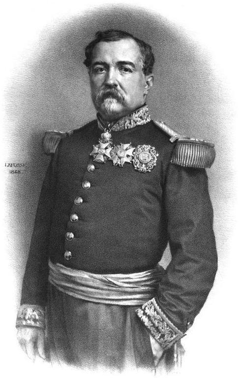 Lamoricière